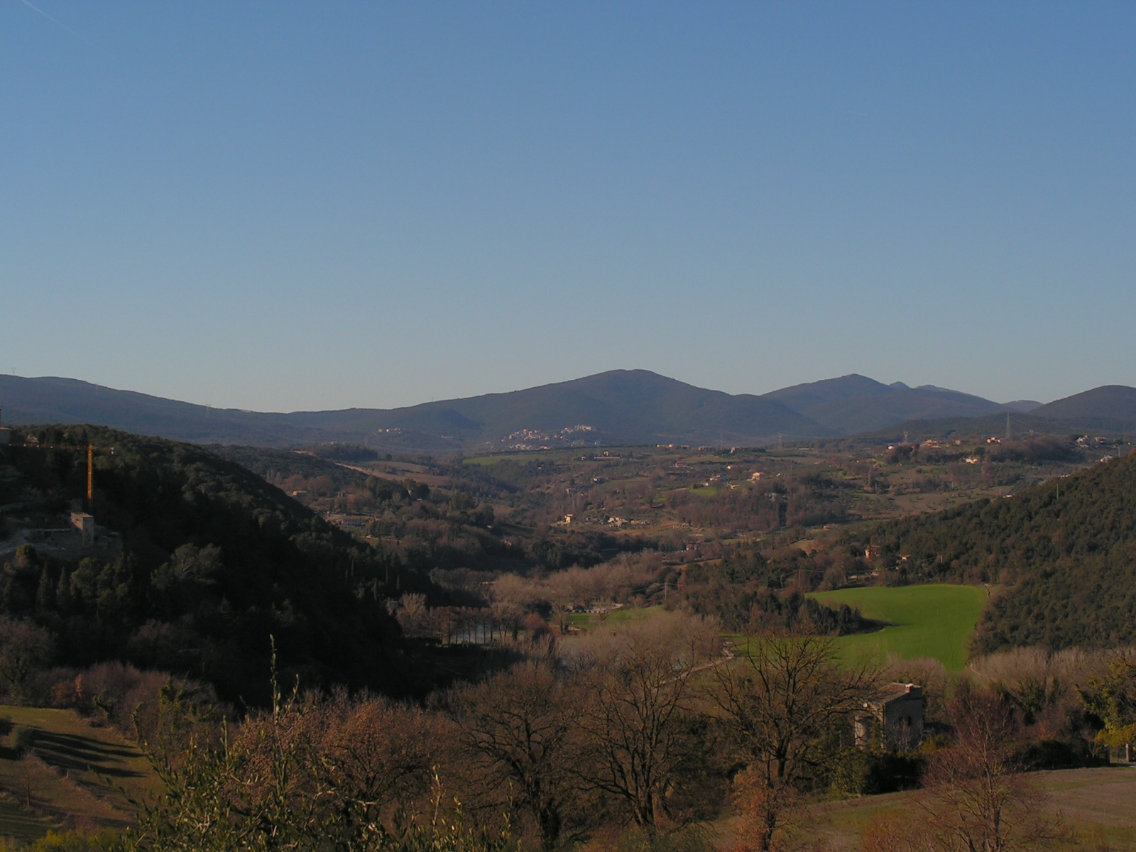 R.Passagrilli Paesaggio amerino intorno ad Amelia